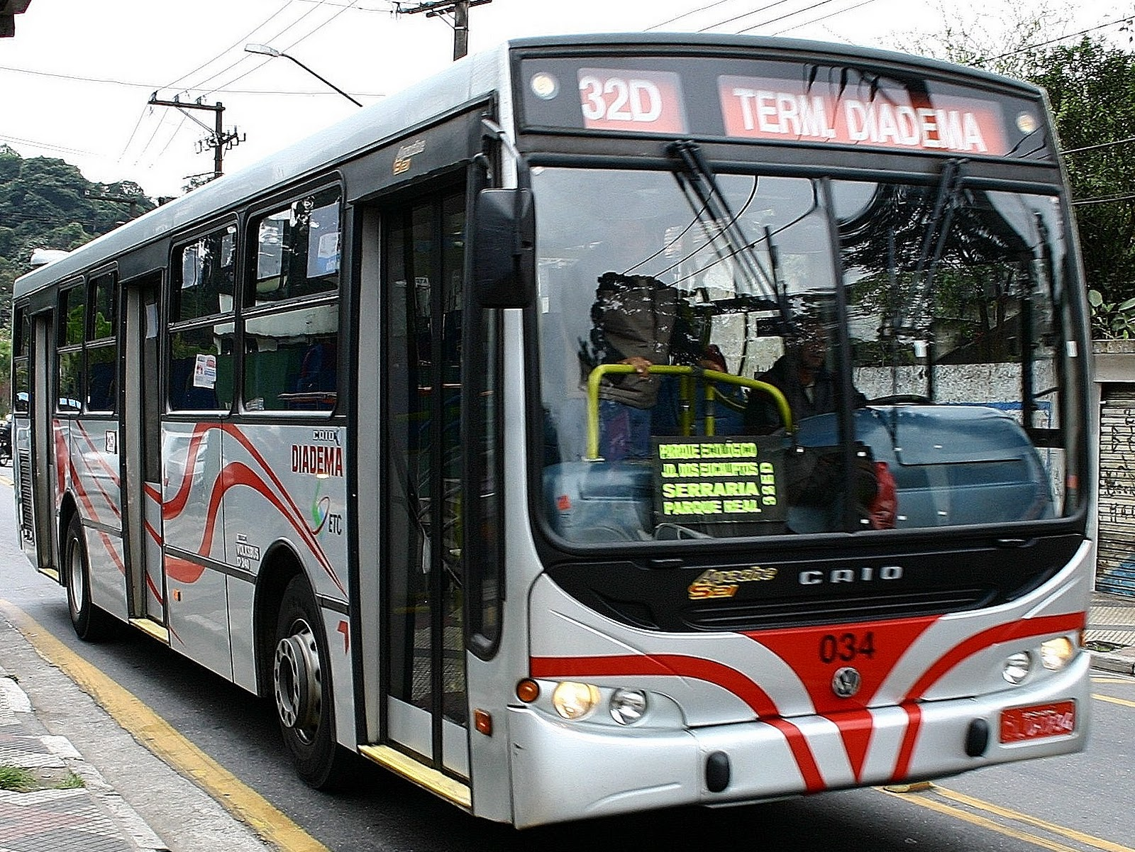 Onibus padrão da ETCD